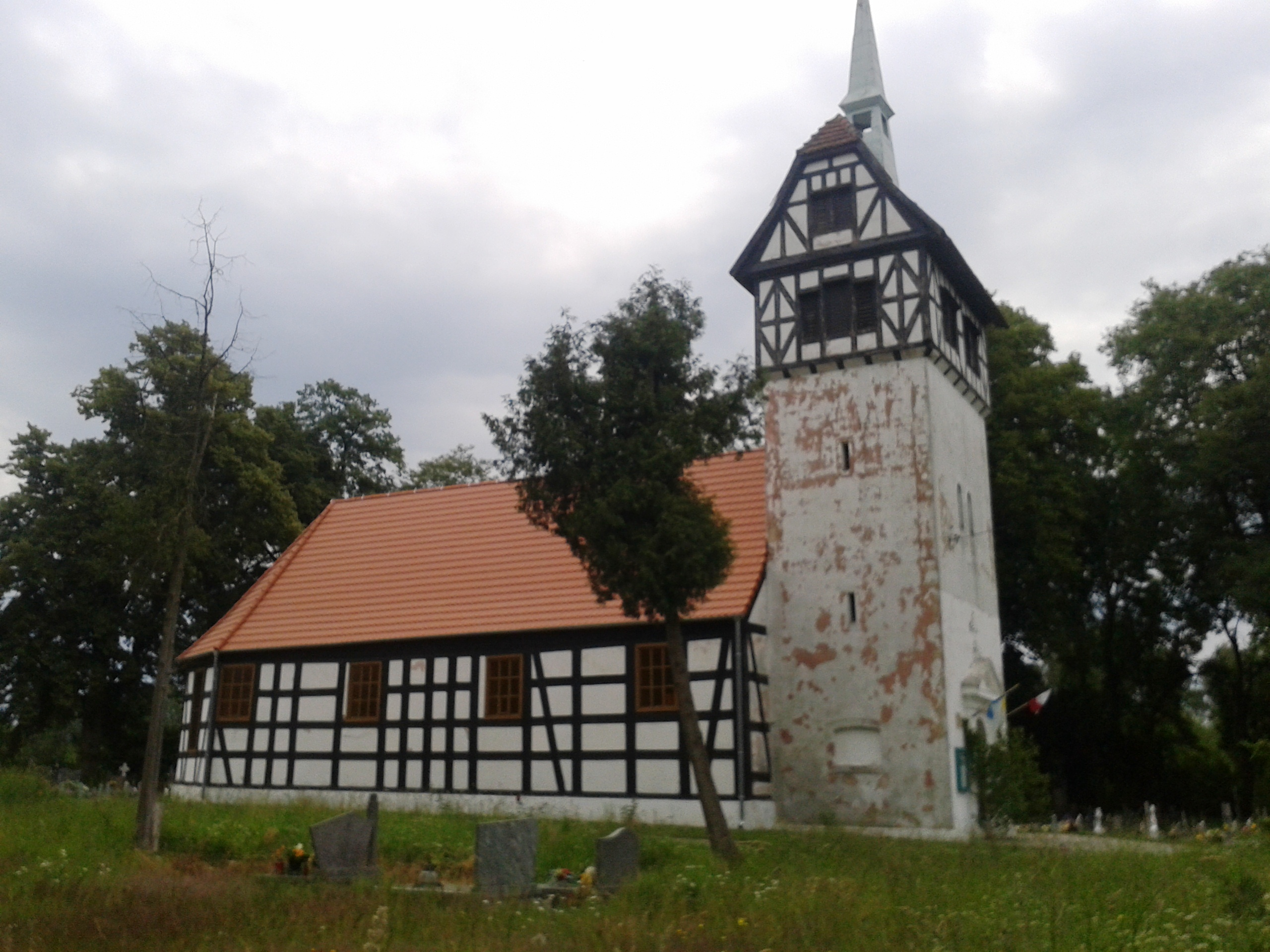 Starogard - kościół - 2014